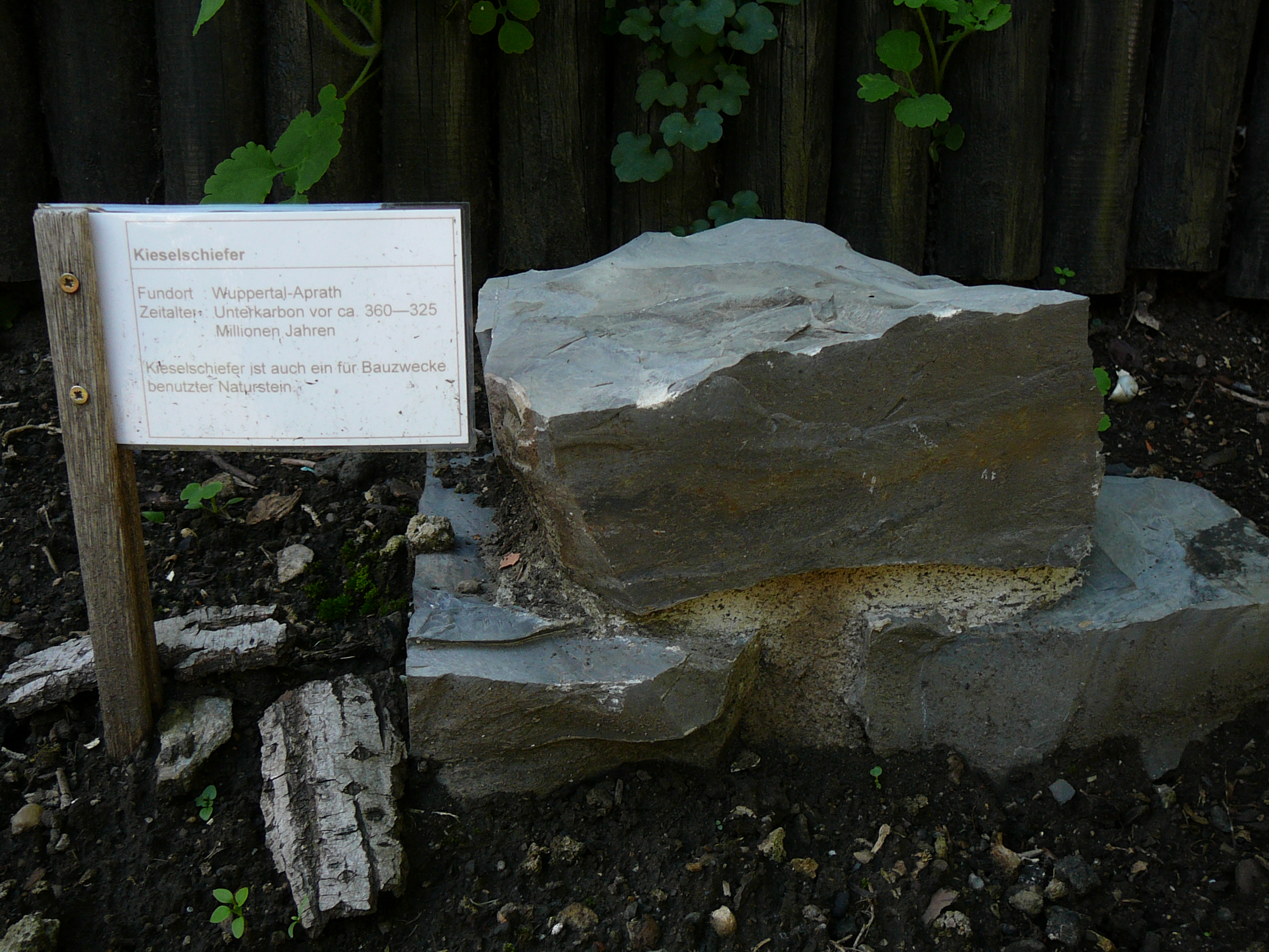 Geologischer Lehrpfad, Heinhauser Weg, Haan